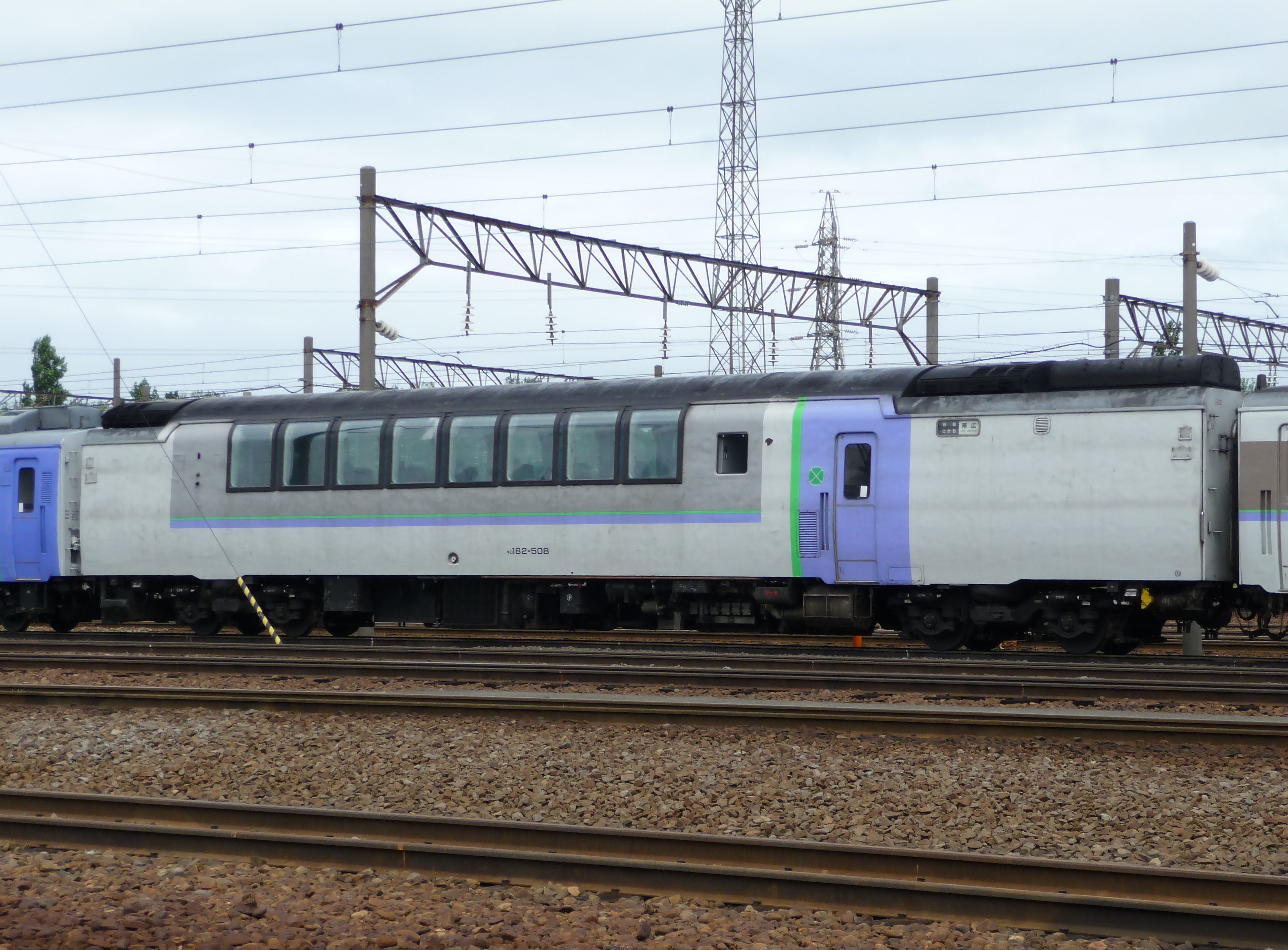 JR北海道キロ182形気動車（キロ182-508）